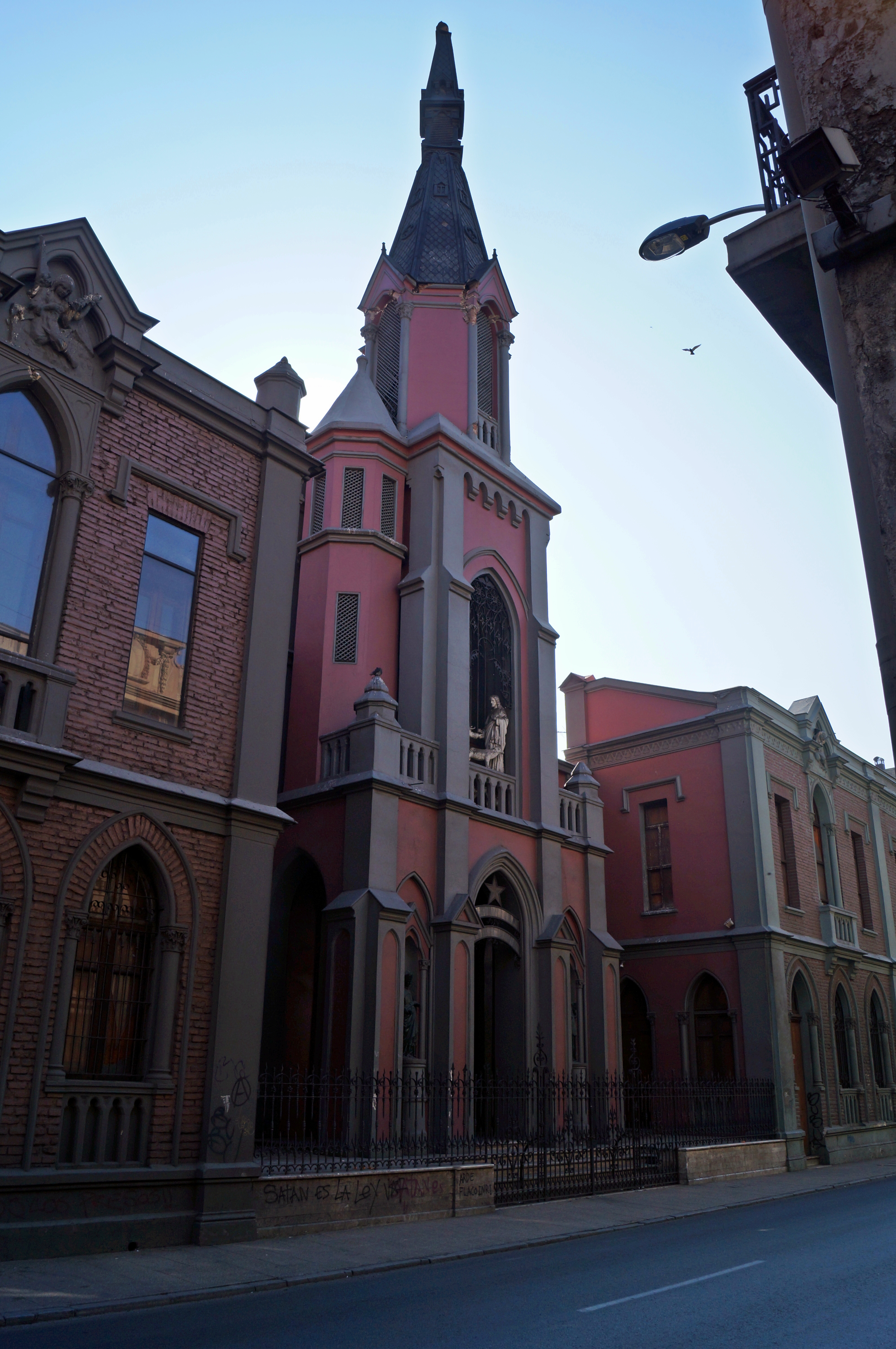 Iglesia San Pedro This is a photo of a national monument in Chile: 875